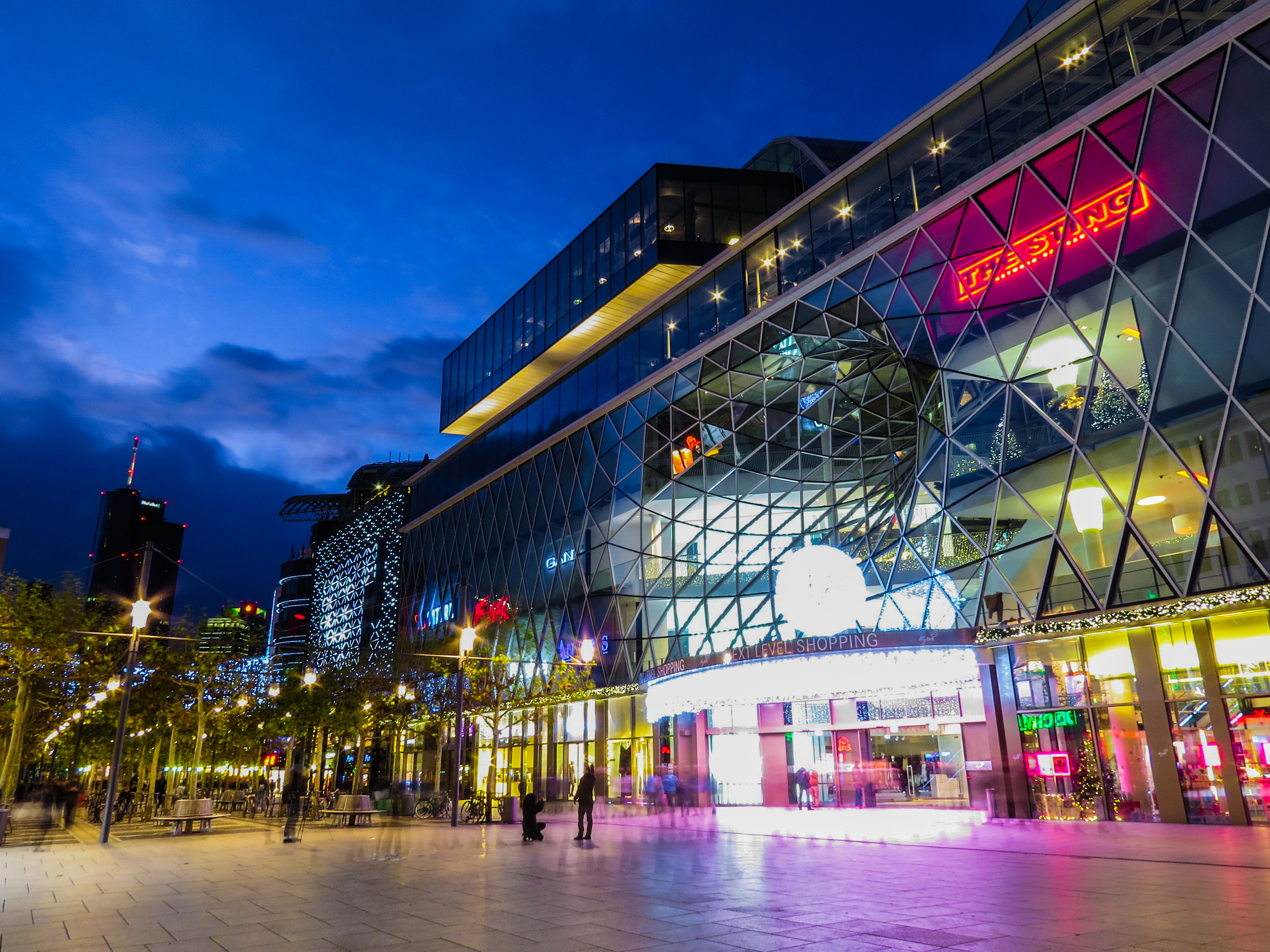 Myzeil